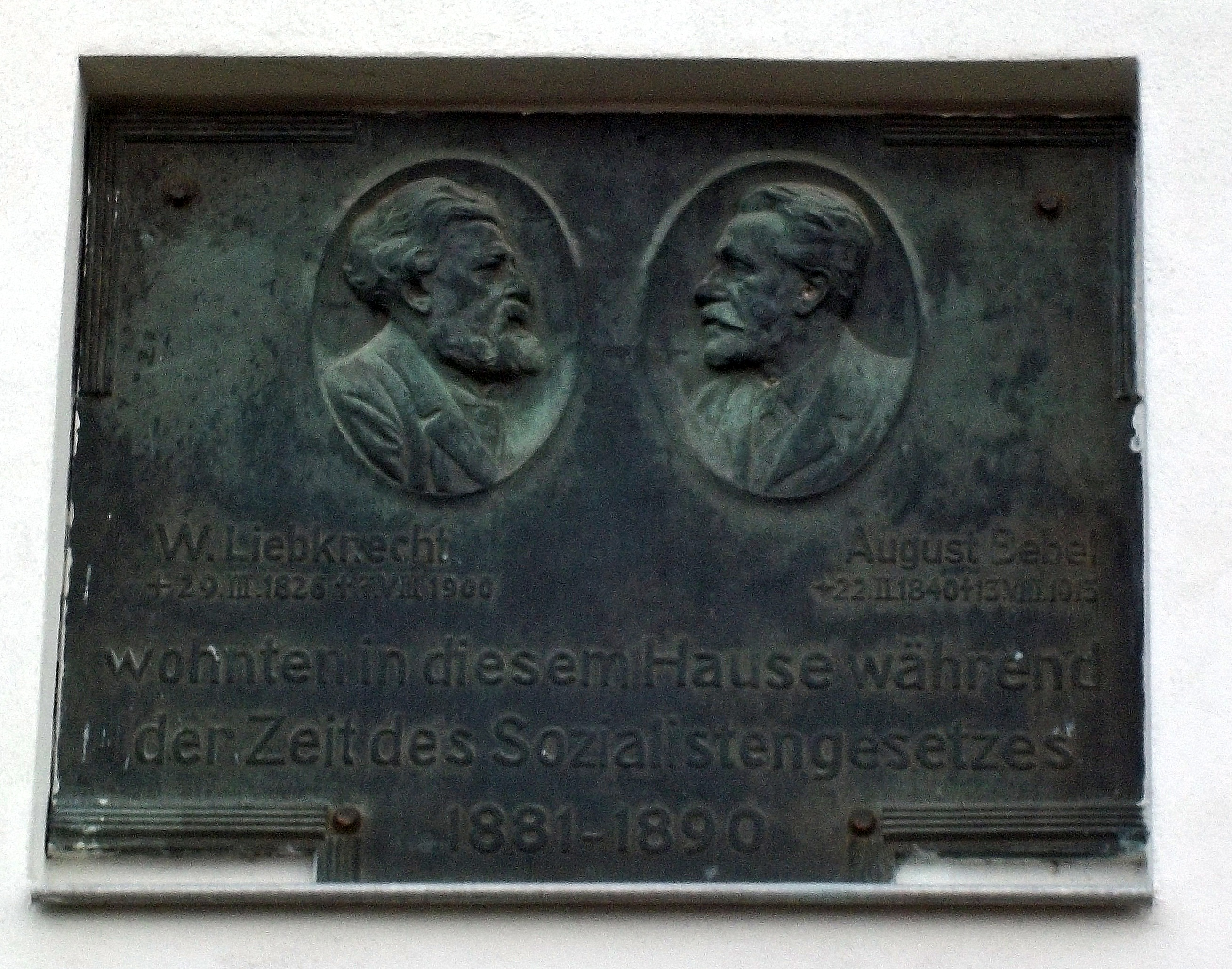 Historische Gedenktafel in Bronze mit Profilbildnissen von Bebel und Liebknecht, die beiden SPD-Führer am Bebel-Liebknecht-Haus in Borsdorf, Gedenktafel enthüllt am 30. März 1930, später versteckt, 1946 wieder angebracht.